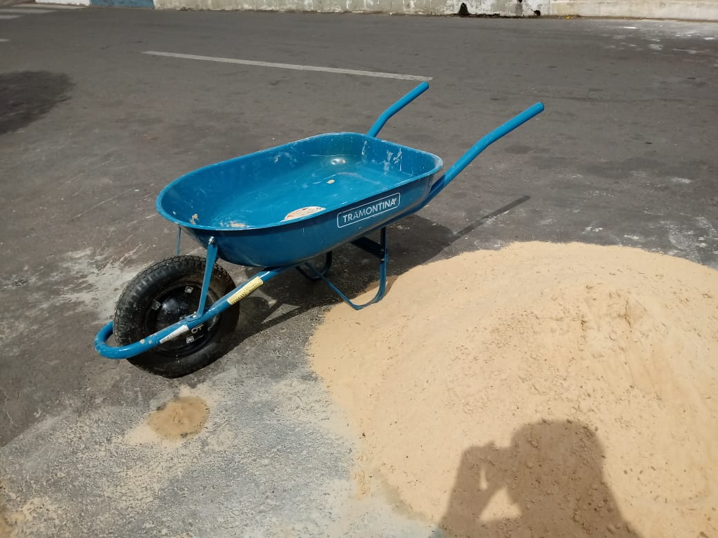 Carrinho de mão da Tramotina numa obra de rua.